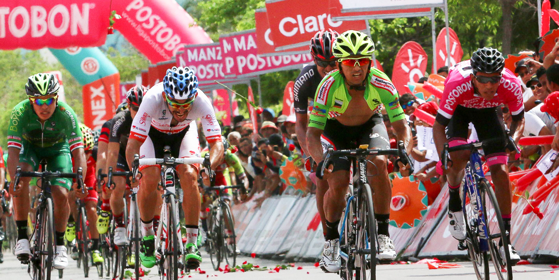 Et.8 Clásico RCN 2016. Jairo Salas en Santa Marta.